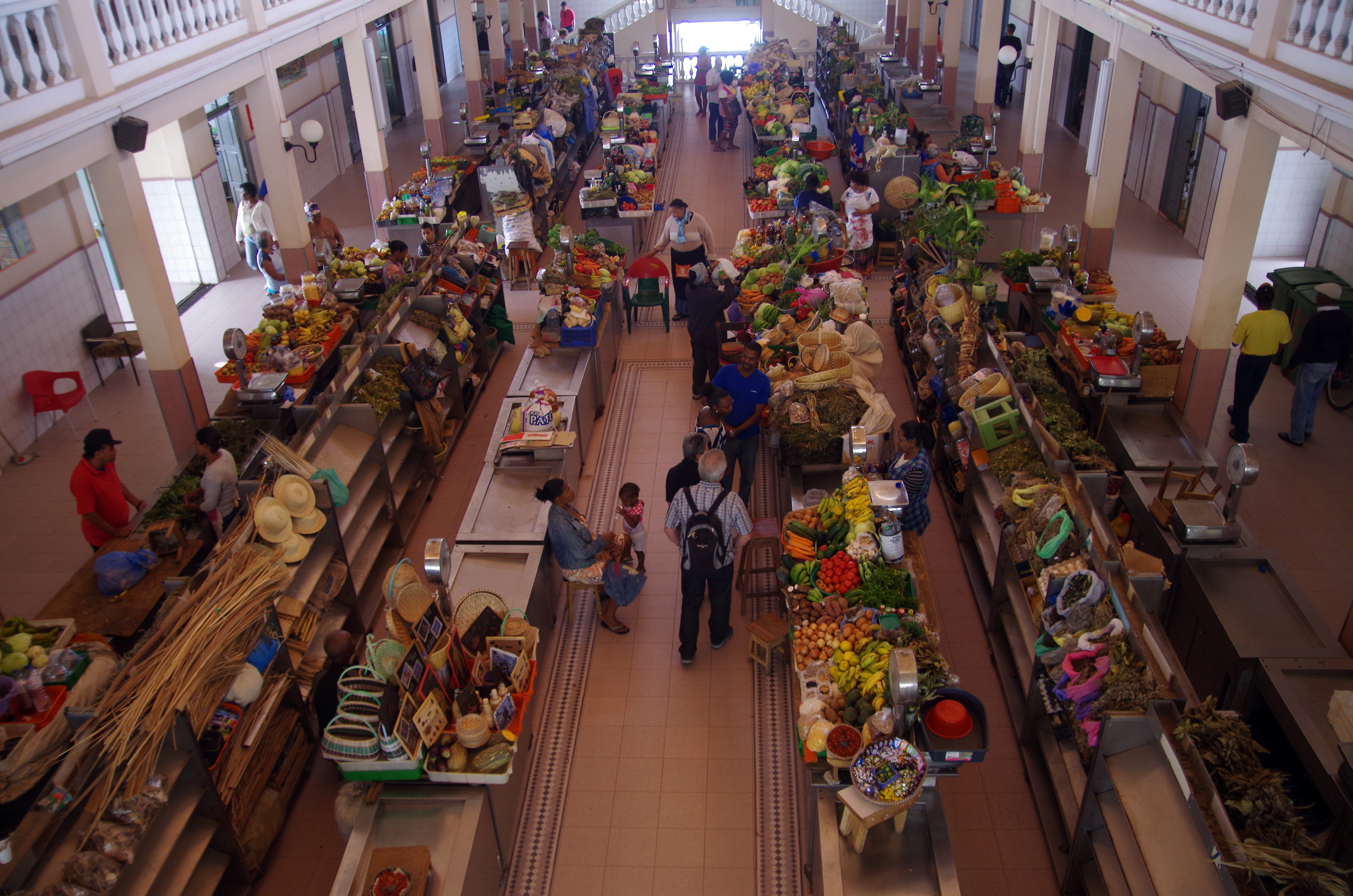 Markthalle Mindelo